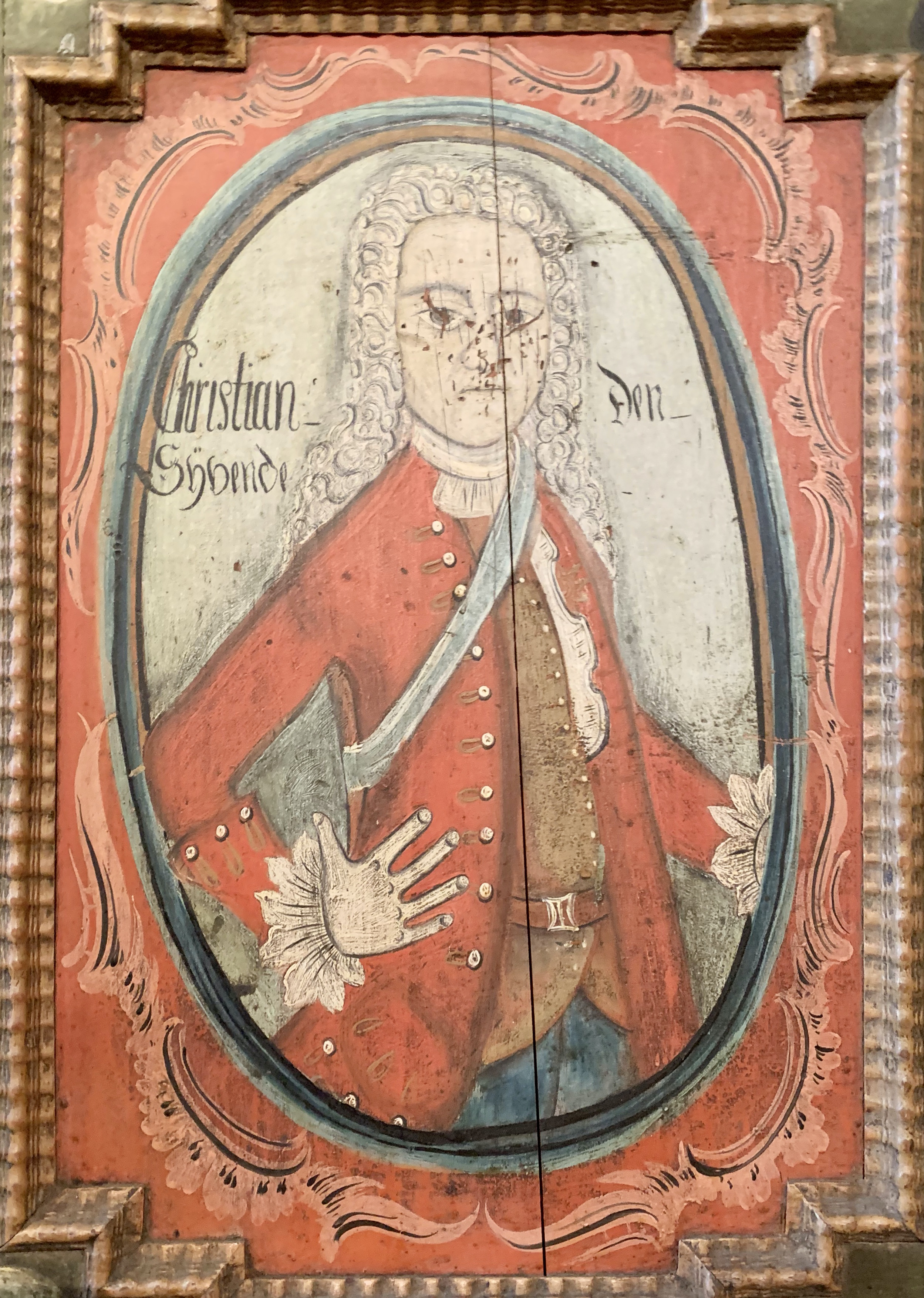 Christian VII på skab, af Herbrand Embrikson Sata, Bergen Museum